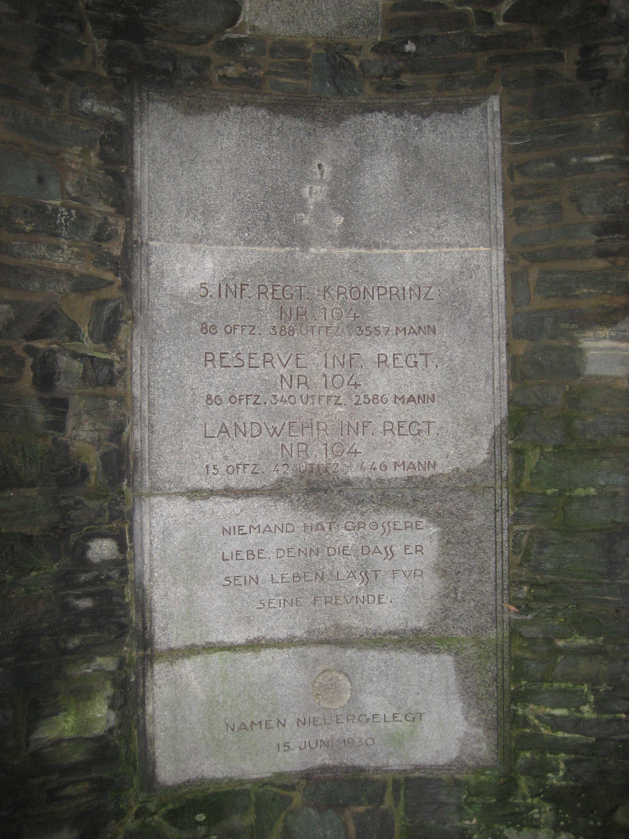 Innenraum des Denkmals für die Gefallenen des 1. Weltkrieges des Infanterie-Regiment „Kronprinz“ (5. Königlich Sächsisches) Nr. 104